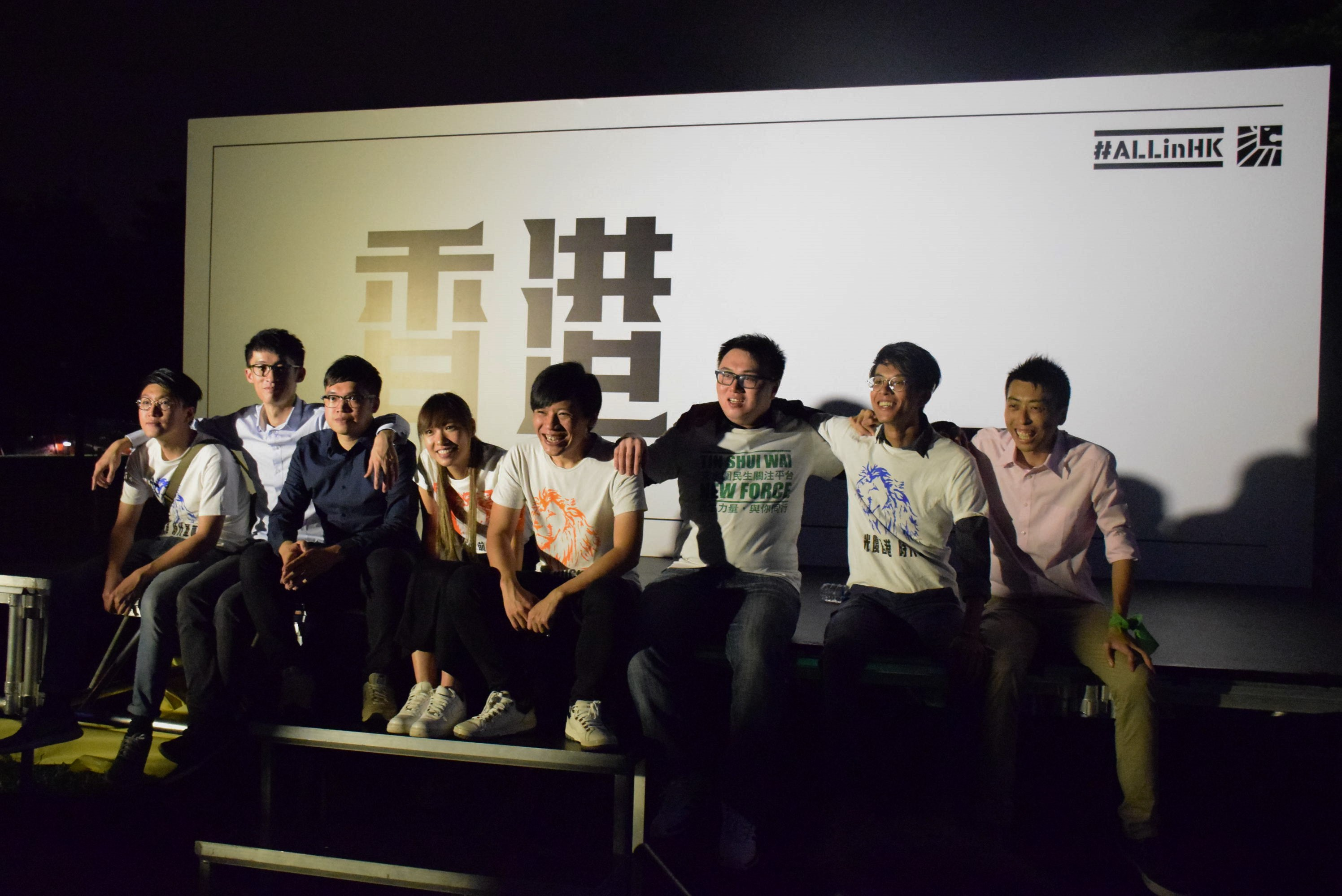 中文（台灣）: 選舉聯盟6名候選人梁頌恆(左二起)、李東昇、游蕙禎、黃俊傑、王百羽、陳澤滔(右一)，與助選的兩名本民前發言人梁天琦(左一)及黃台仰(右二)。(VOA 湯惠芸攝)